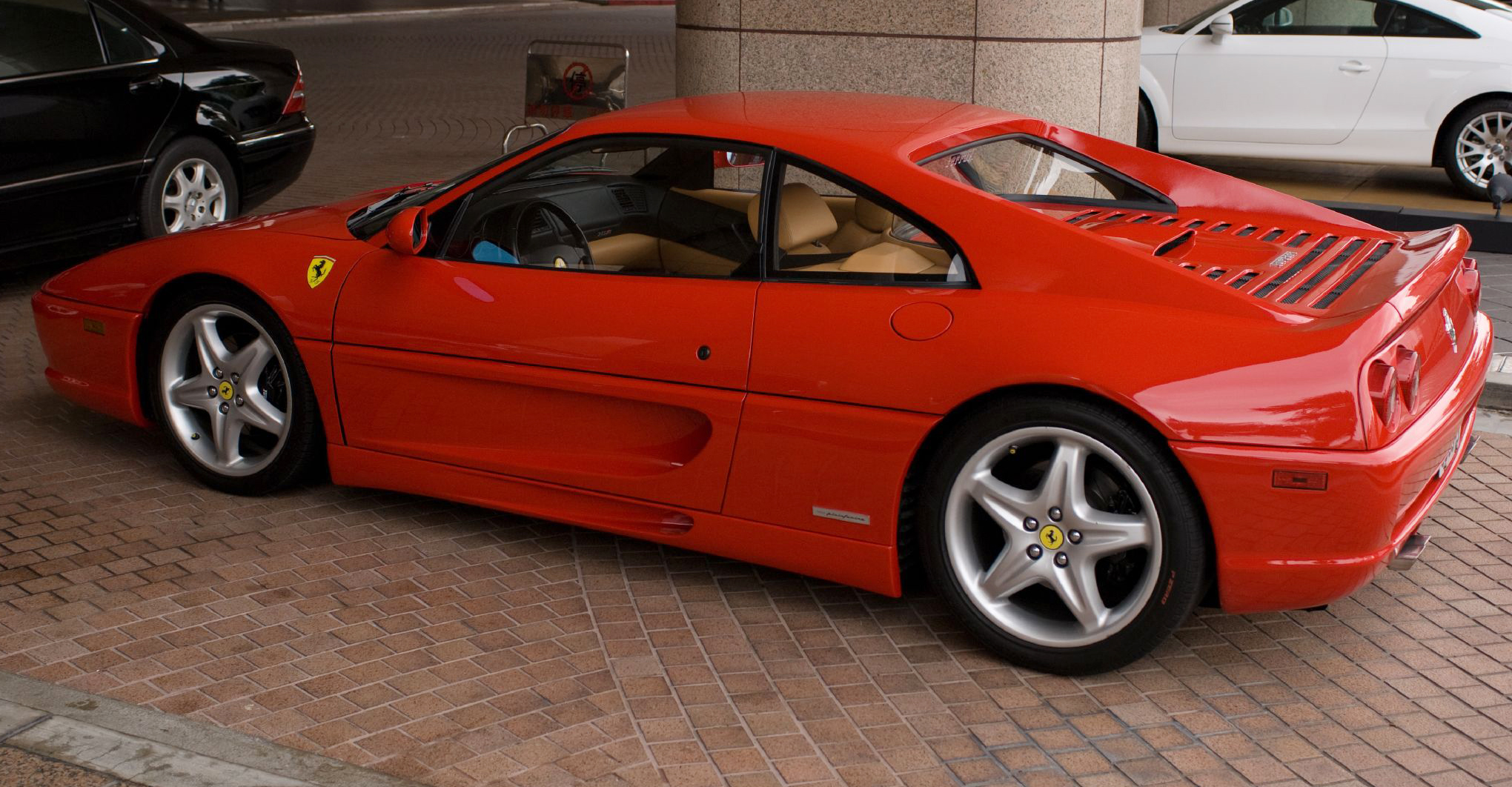 Ferrari F355 Berlinetta in Taipei, Taiwan